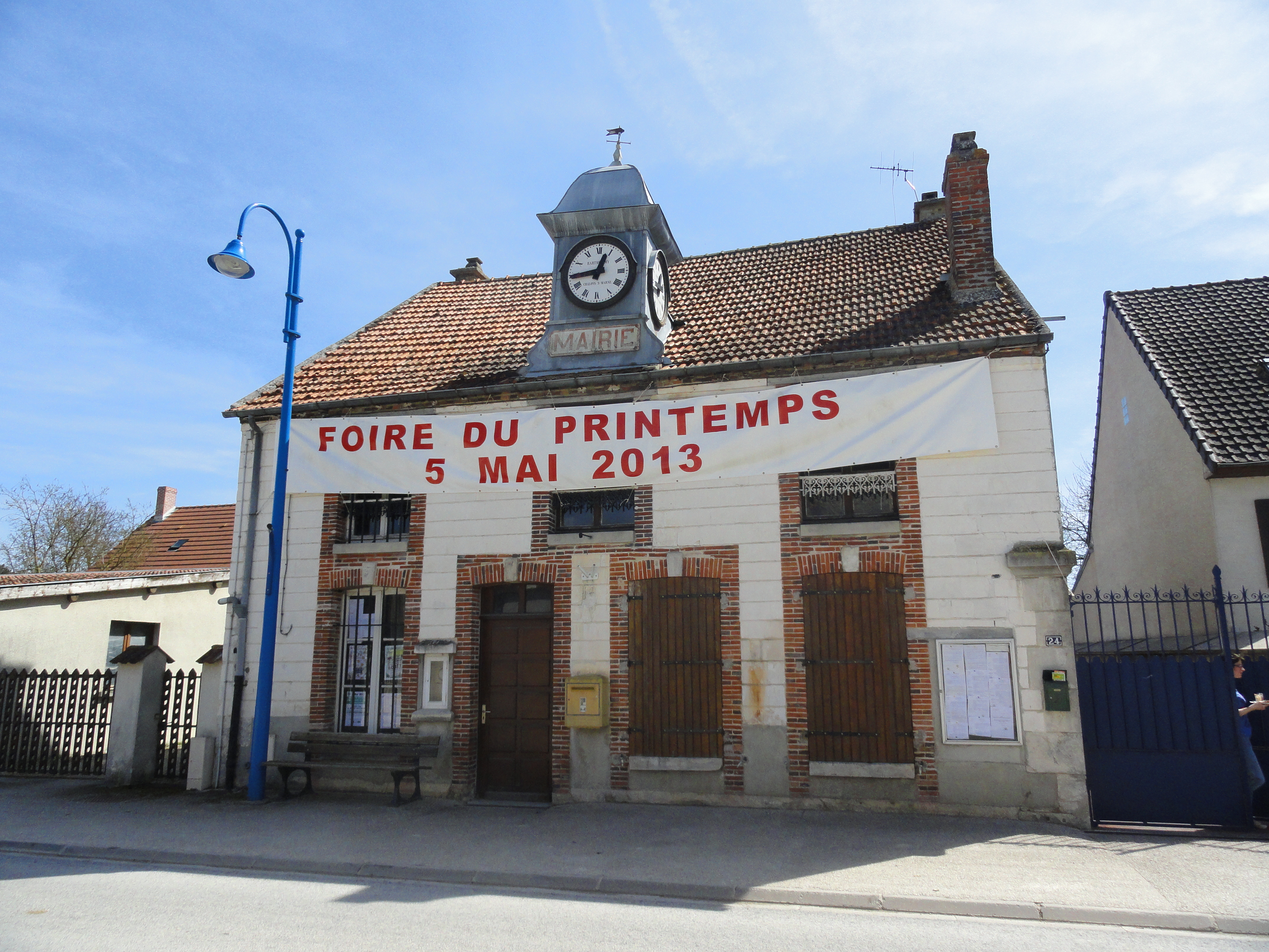 La mairie de Cherville, à la mi-avril 2013.